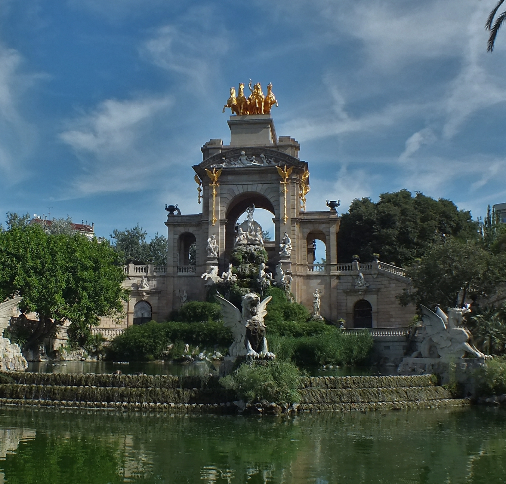 Parc de la Ciudadela, localizado en Barcelona